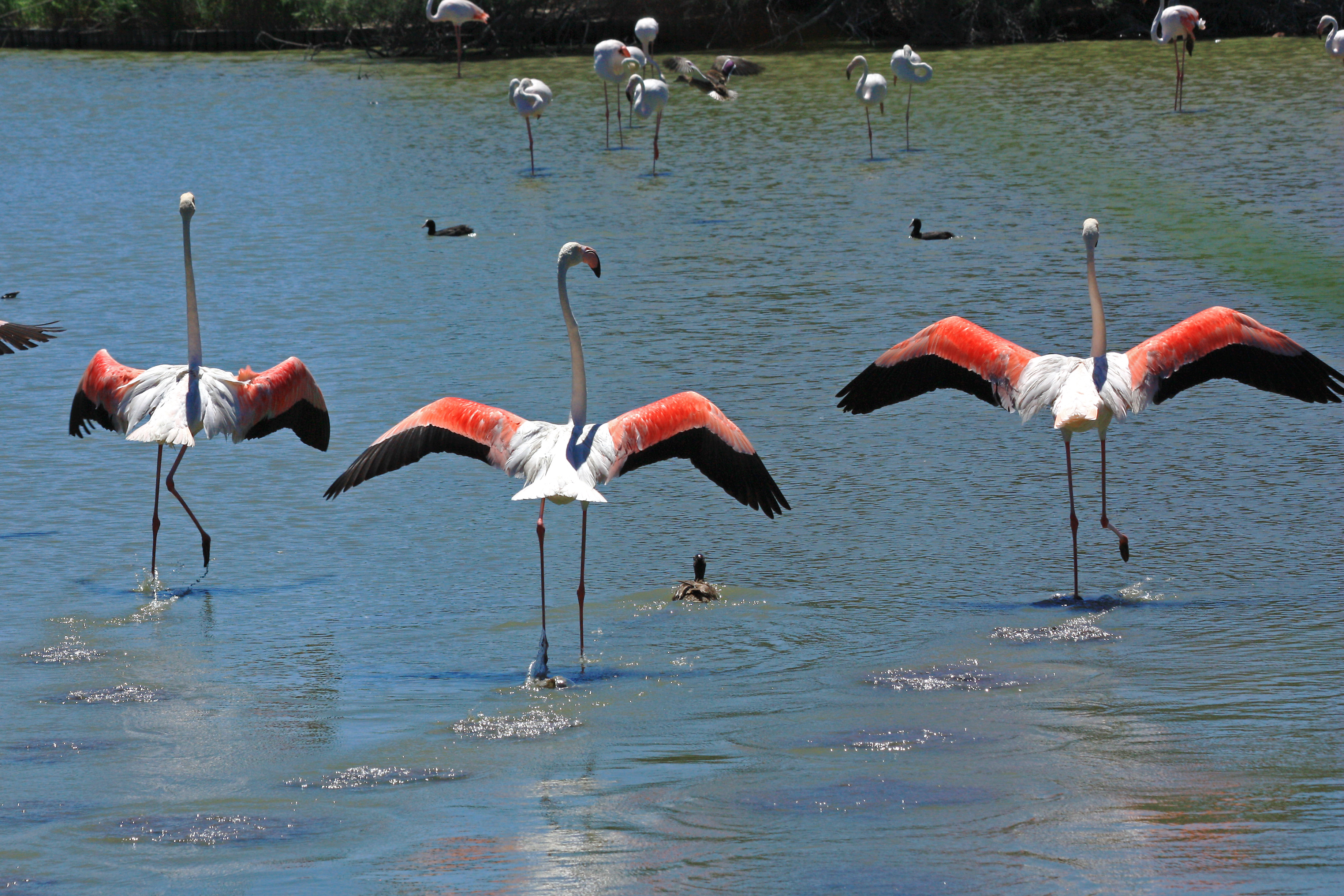 Flamants roses Phoenicopterus roseus à l'envol en Camargue